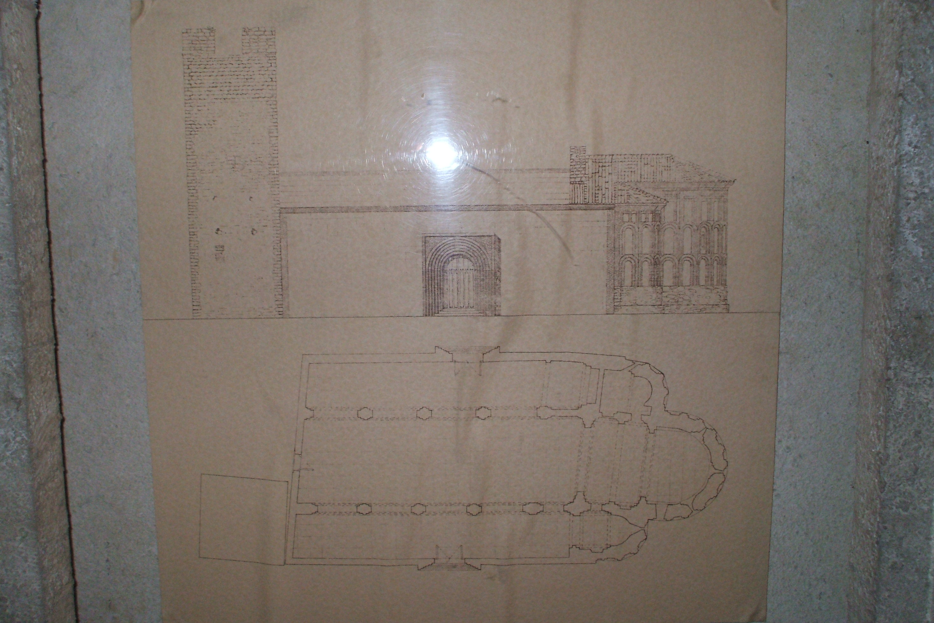 Panel que representa la planta y alzado de la iglesia de San Martín (Cuéllar)